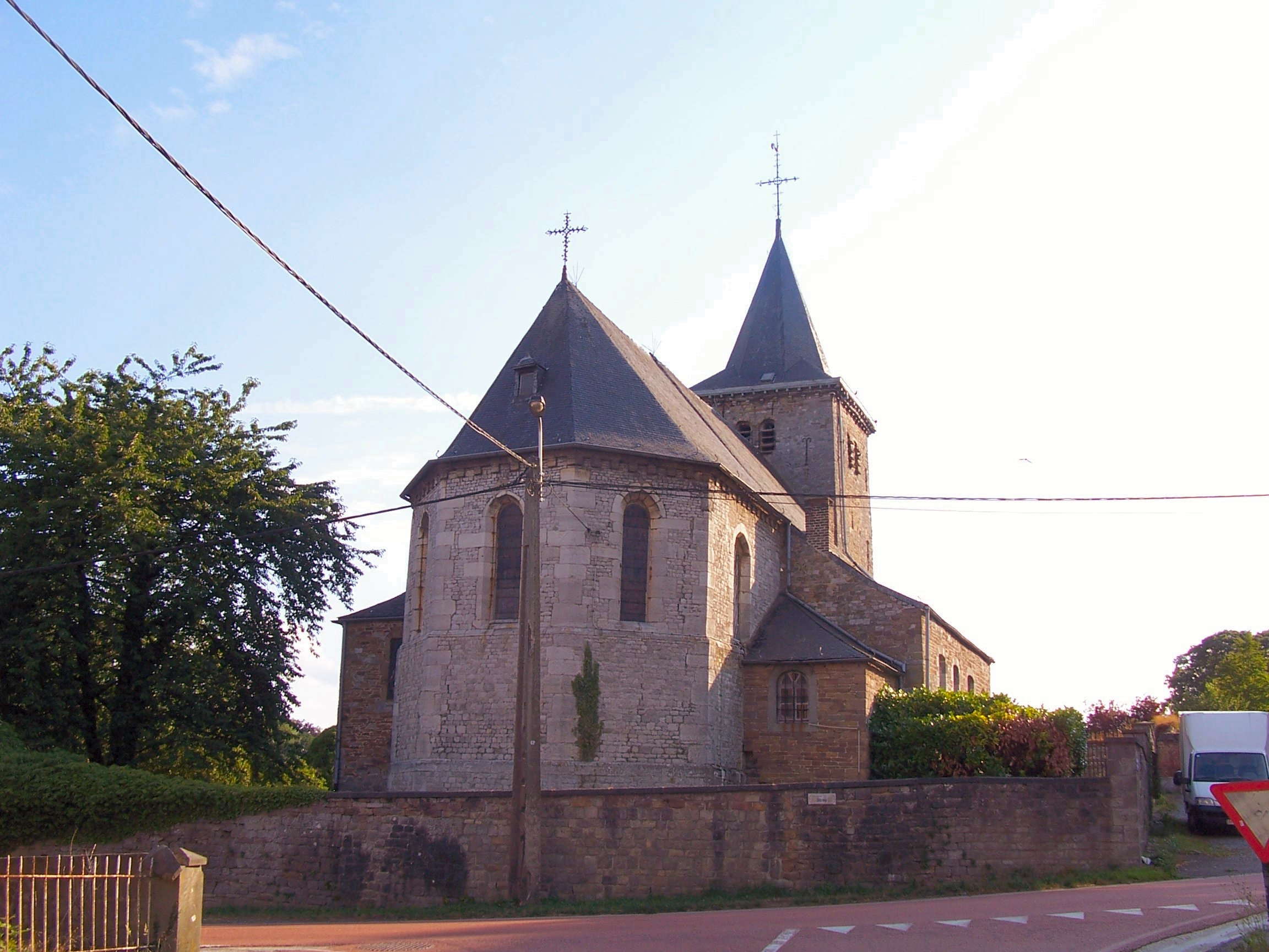 De kerk van Strée.